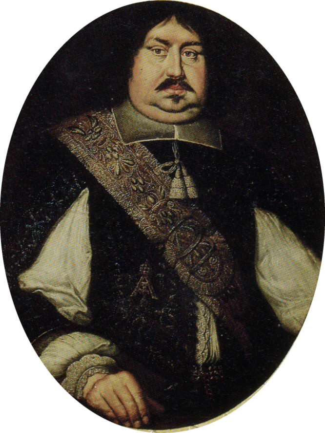 Johann von Schleswig-Holstein-Gottorf (1606-1655), known as "Bischof Hans". Prince-Bishop of Lübeck